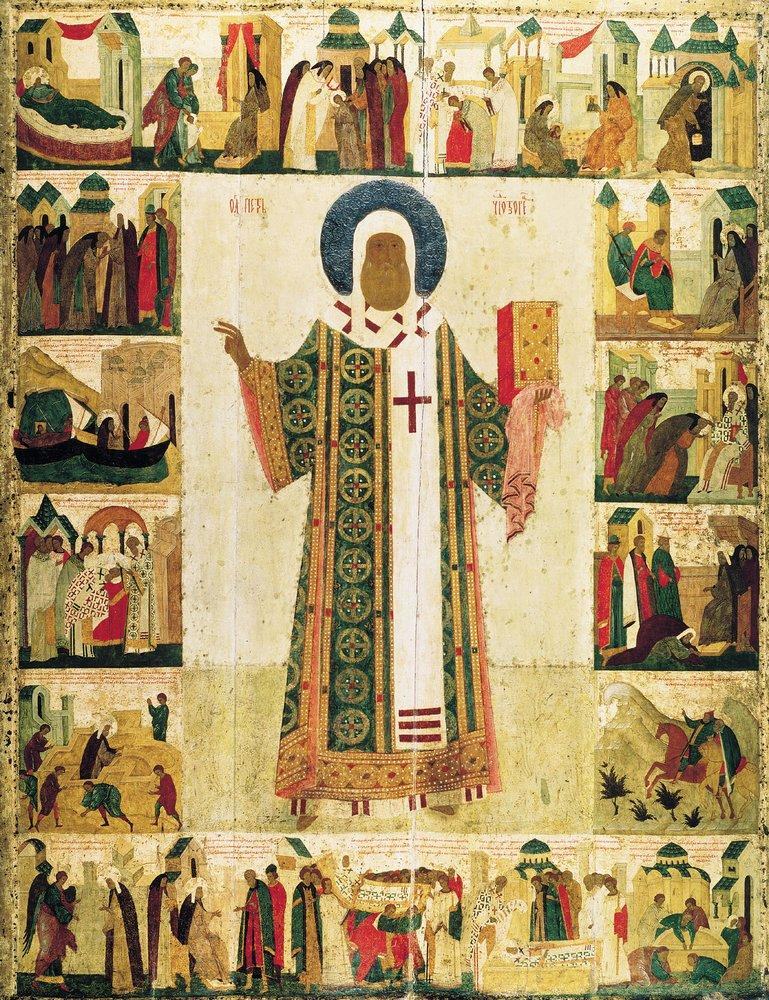 Митрополит Пётр с житием